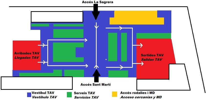 Serveis primer nivell de l'estació de la Sagrera